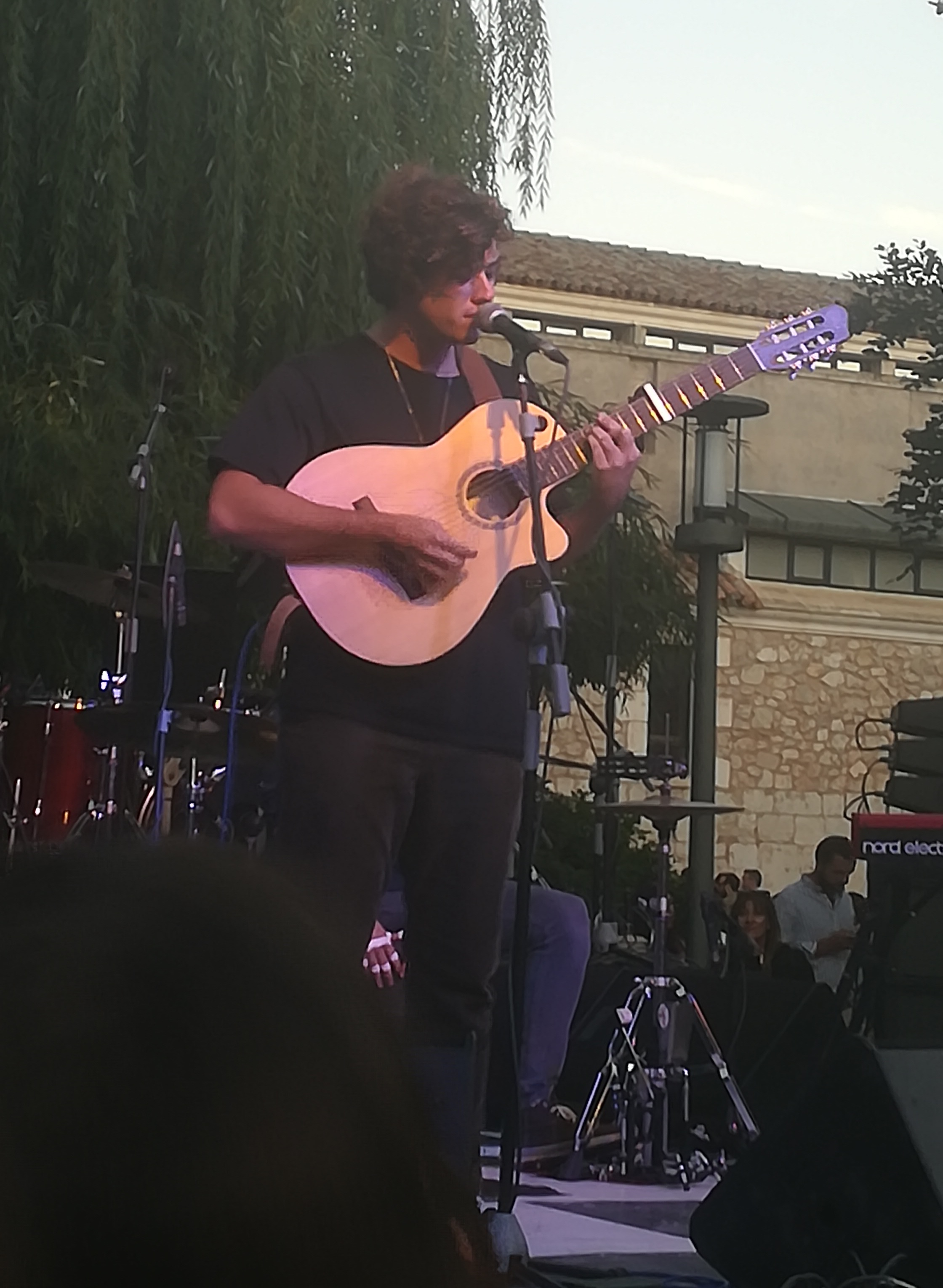 Alvaro Lafuente (Guitarricadelafuente) en un concierto en Burgos